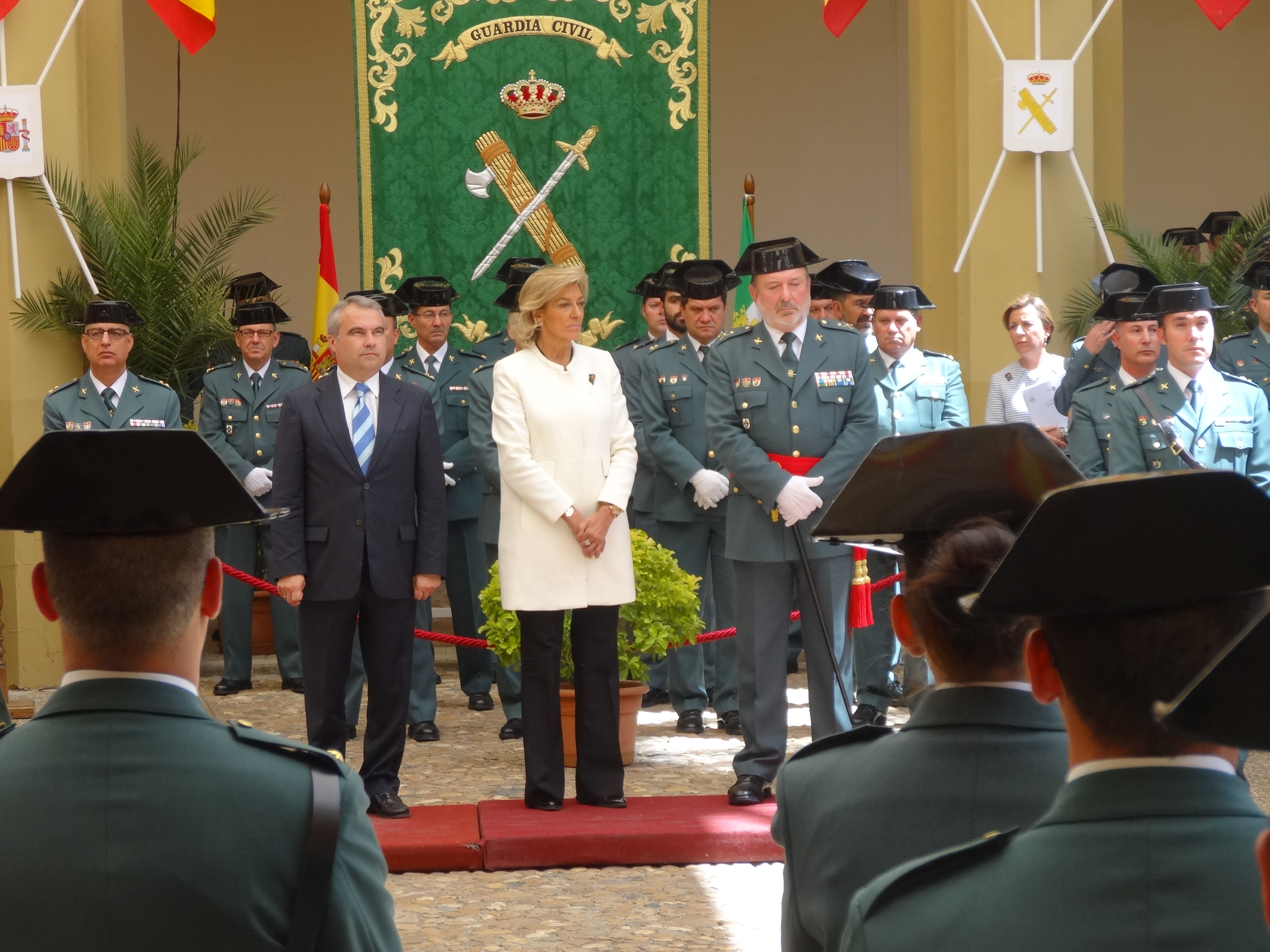 La delegada del Gobierno en Extremadura, Cristina Herrera, preside el acto de toma de posesión del teniente coronel jefe de la Comandancia de la Guardia Civil de Badajoz.